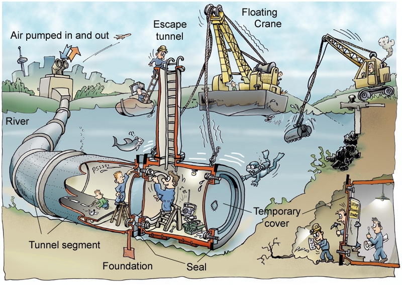 Aanbouw van een tunnel.